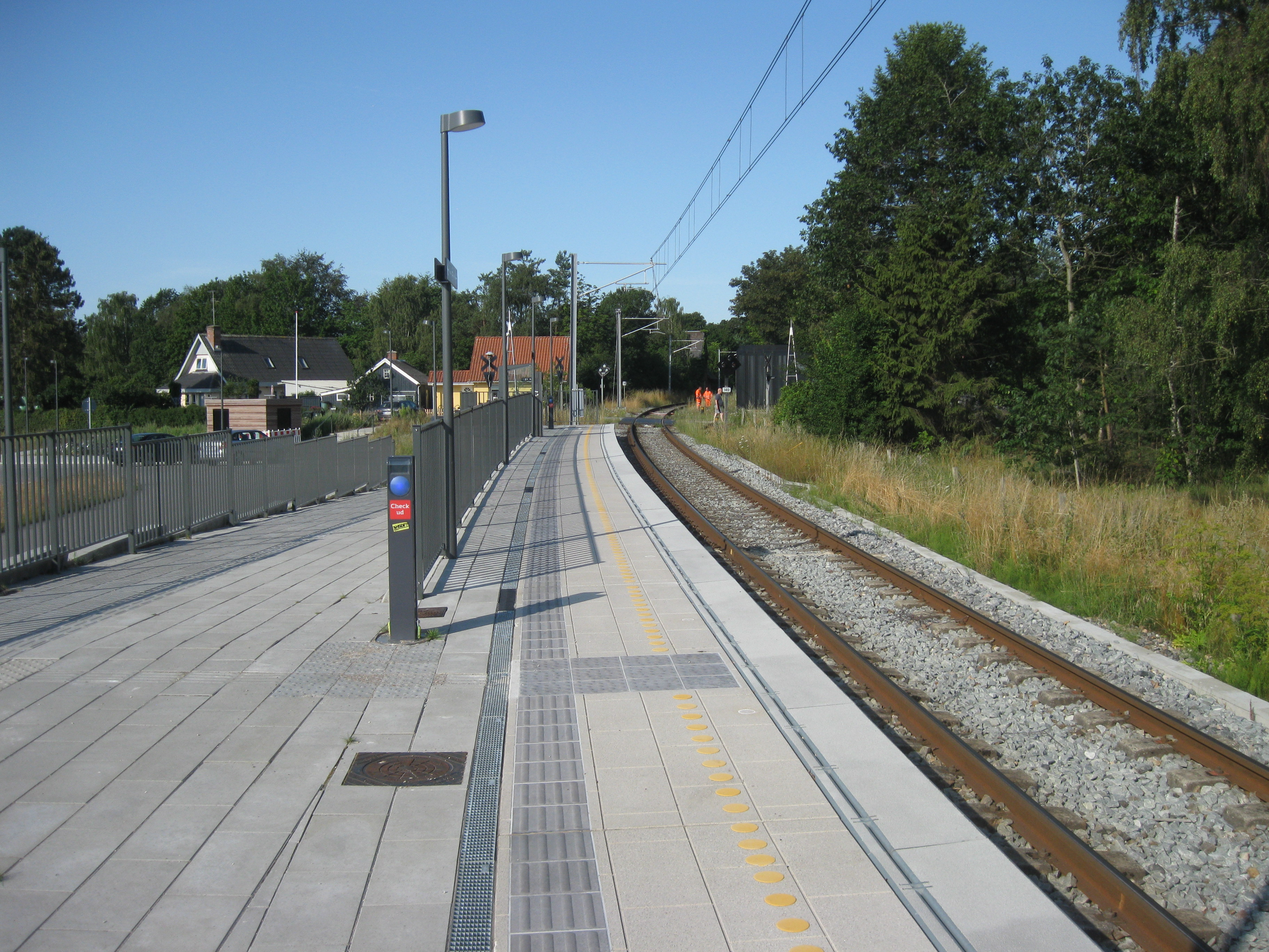 Thorsager Station, Letbanen, Syddjurs